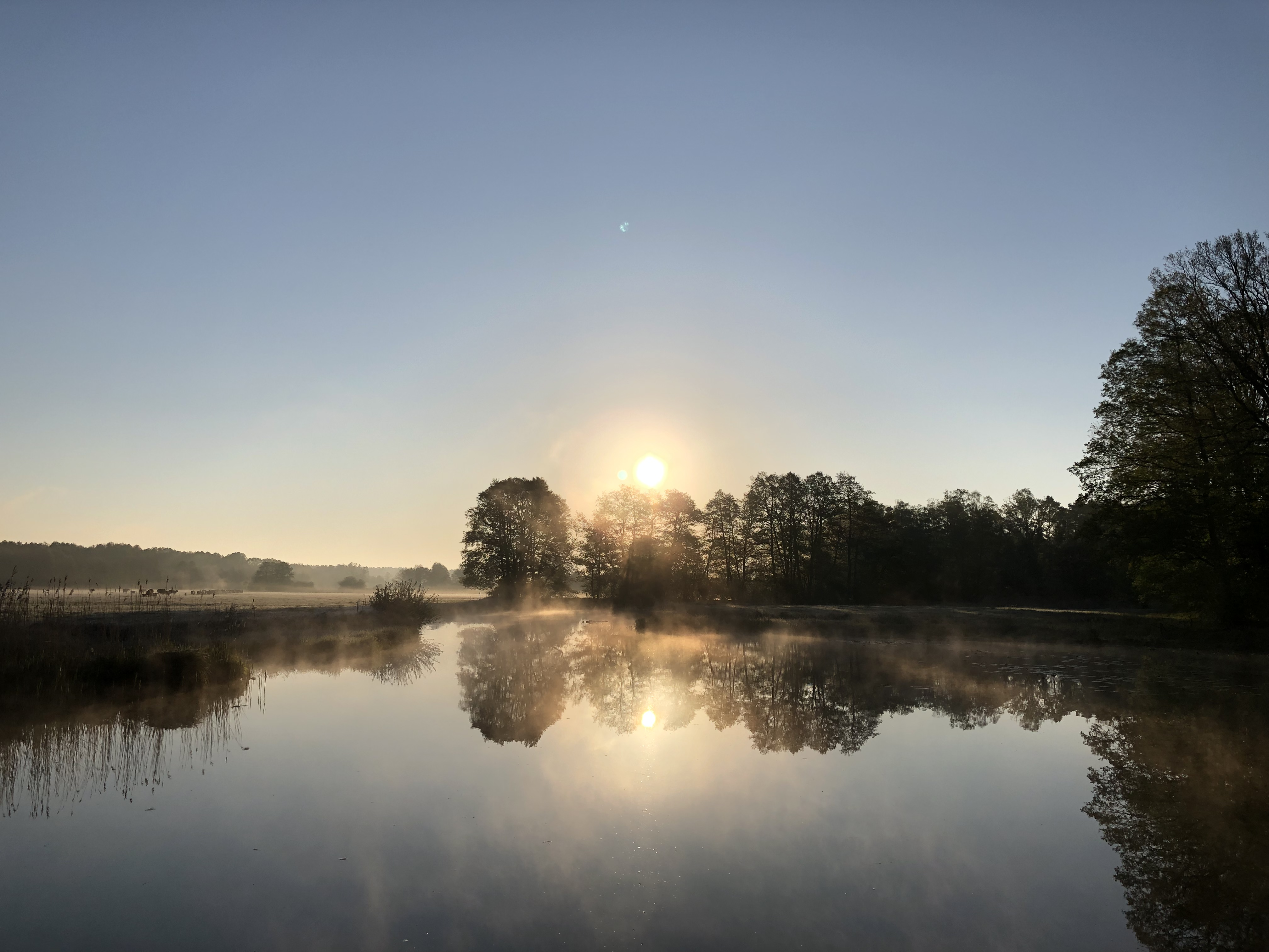 FFH-Gebiet DE 2735-301 „Alte Elde zwischen Wanzlitz und Krohn“ Von der Krohner Brücke sieht man die alte Elde kurz bevor sie in den eldekanal mündet